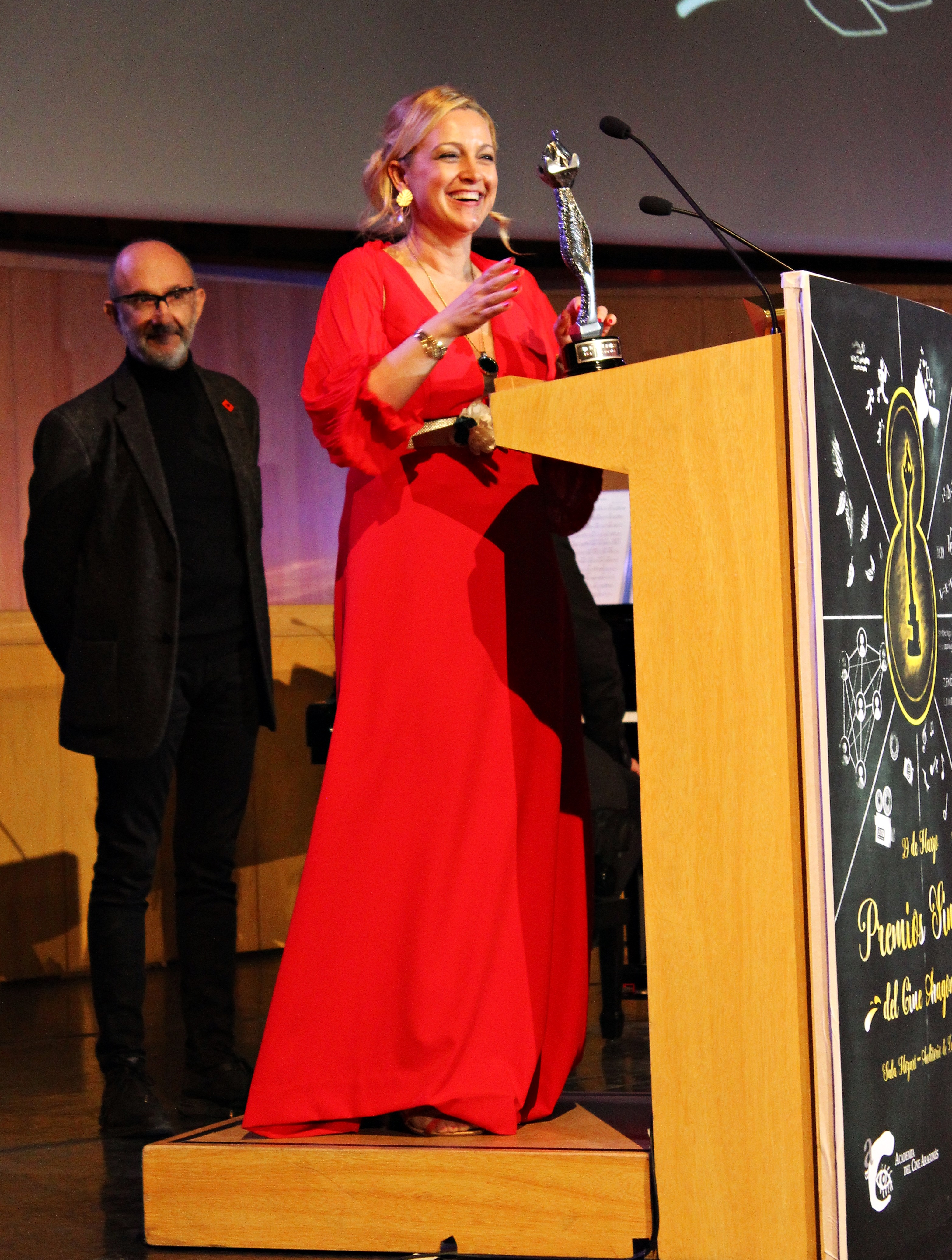 La cineasta española Elena Cid agradece la recepción del Premio Simón al mejor documental por Bécquer y las brujas.